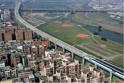 中文（台灣）: 臺64線快速公路經過二重疏洪道西側。